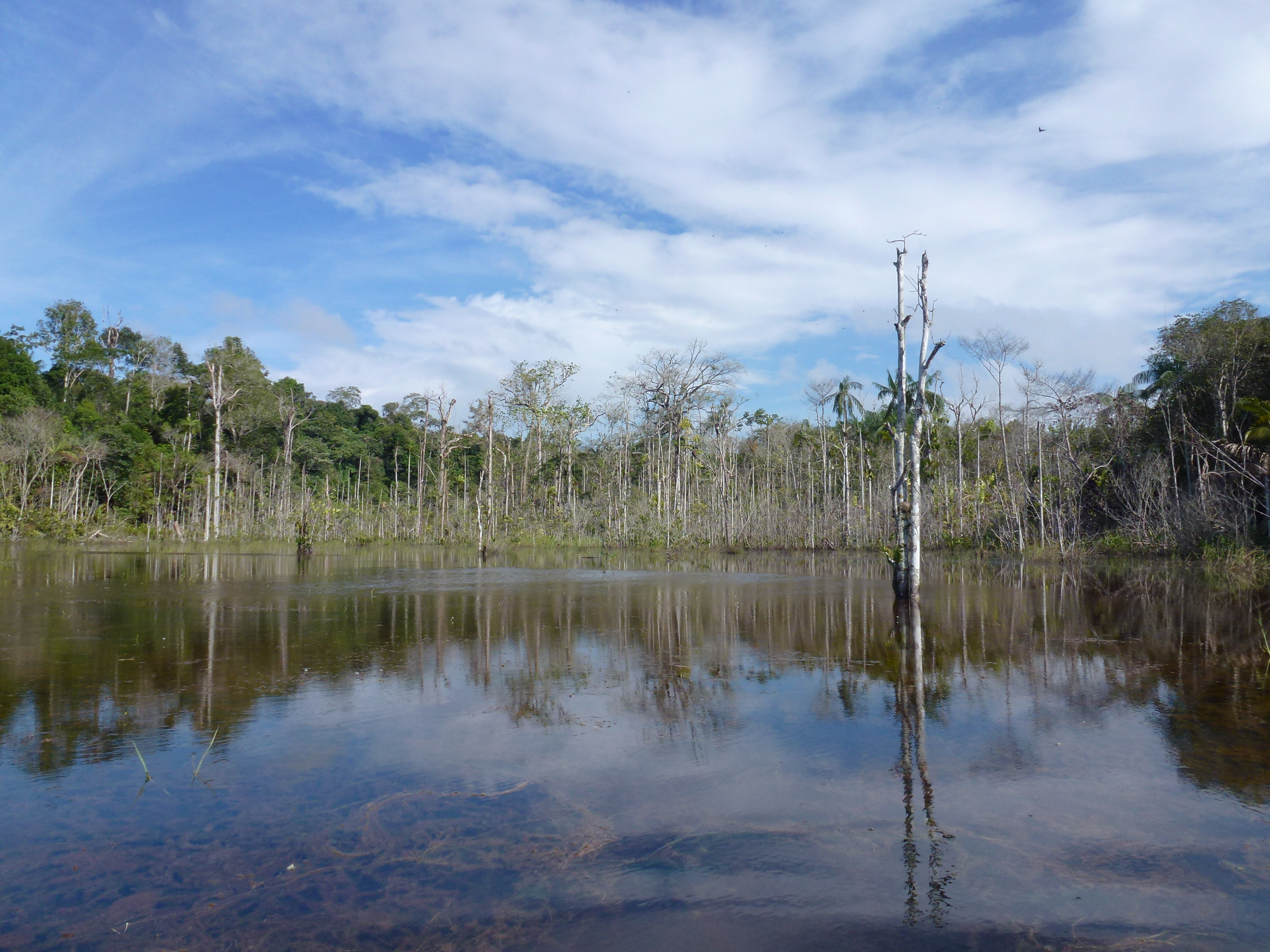 Paisagem típica amazonense em época de cheia, onde as florestas ficam submersas.